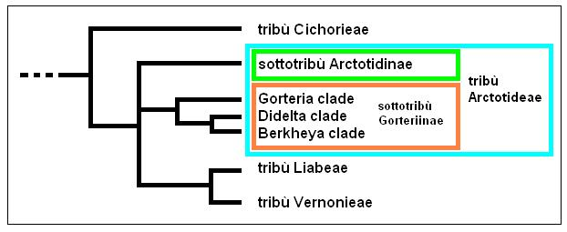 Arctotideae - Cladogramma della tribù